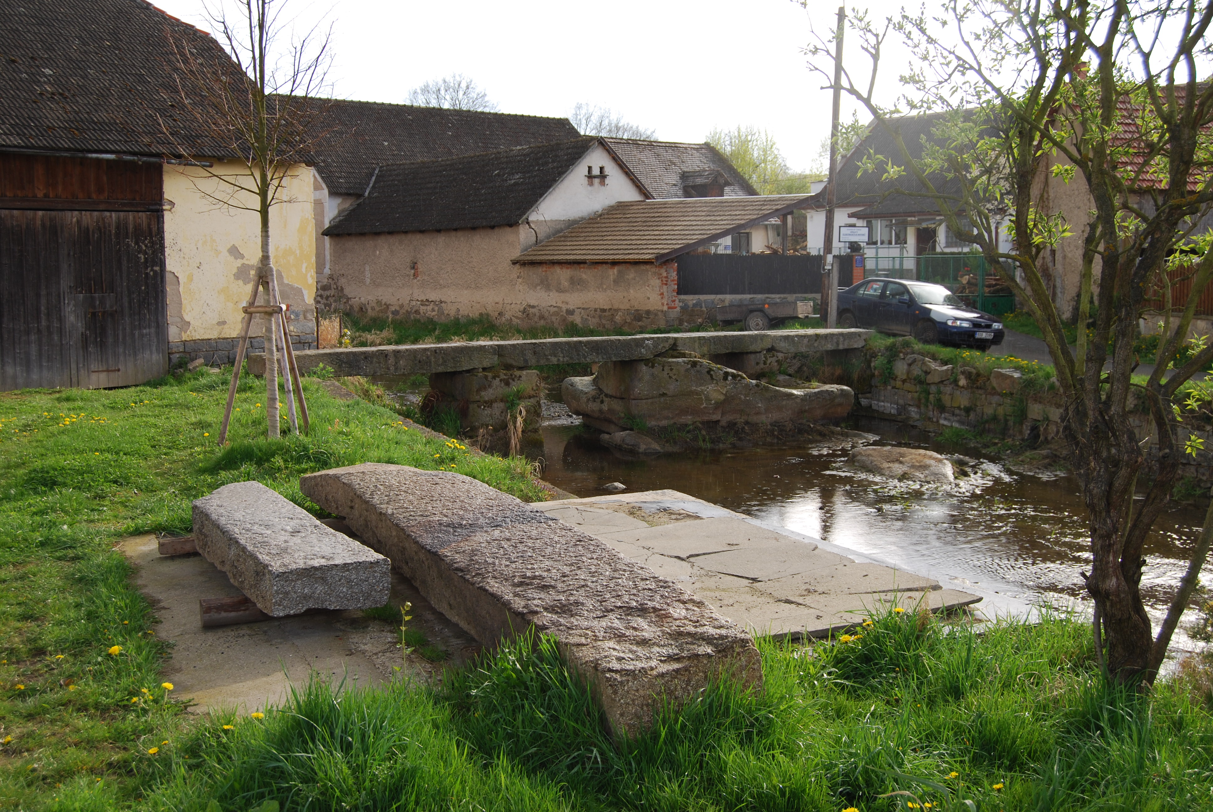 Historická kamenná lávka přes potok Slabá poblíž kaple. Kamenice (Nedrahovice) v okrese Příbram, kraj Středočeský. Česká republika.